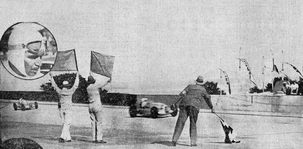 Grand Prix automobile de France 1935, victoire de Rudolf Carraciola.